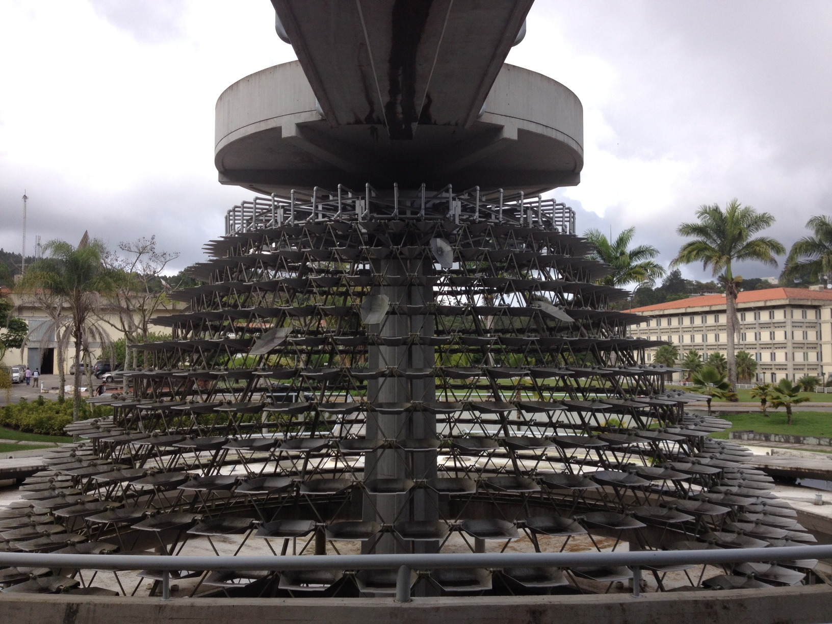 Estado de la fuente actualmente.